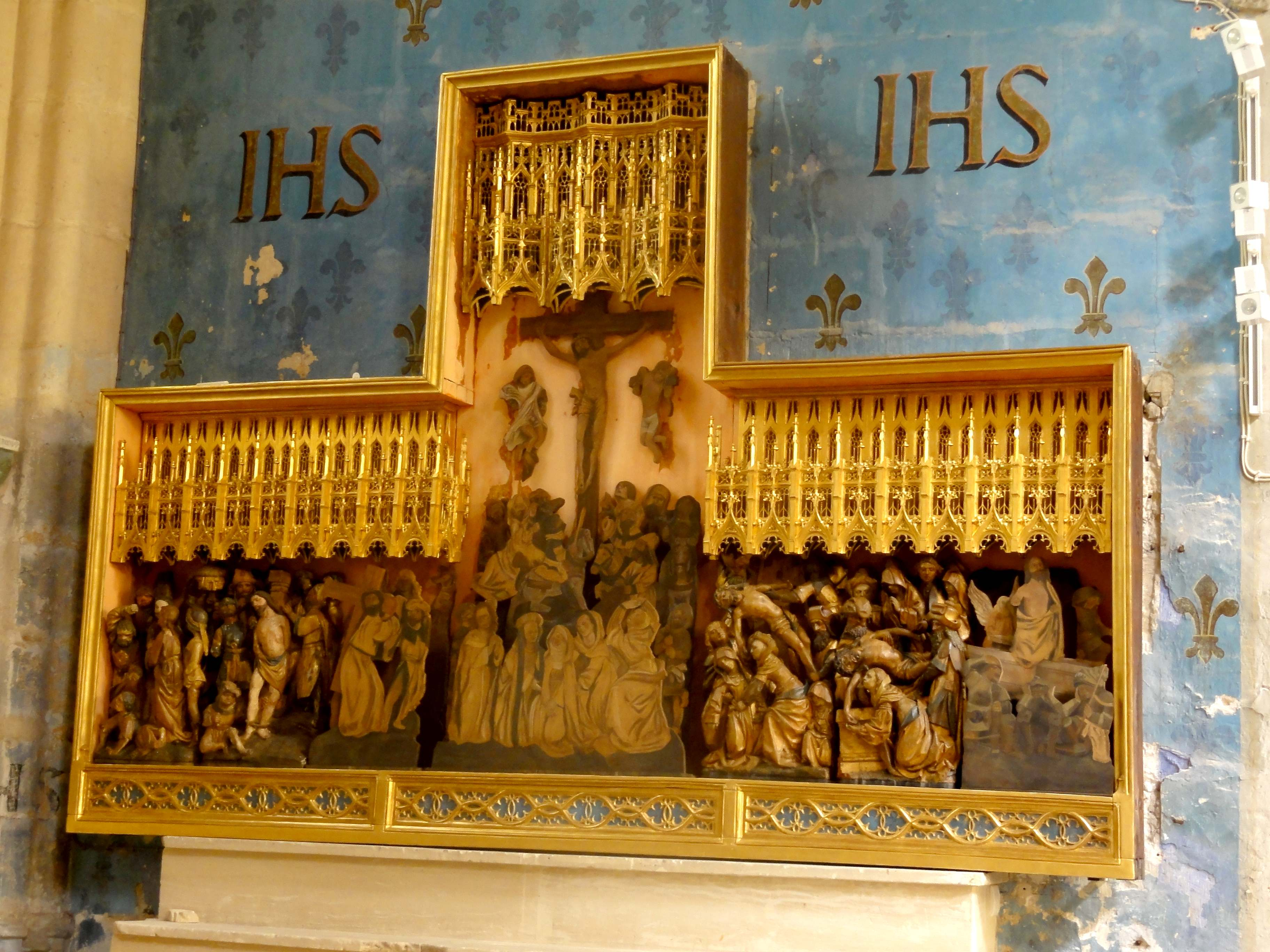 Retable de la Passion, volé en 1934.